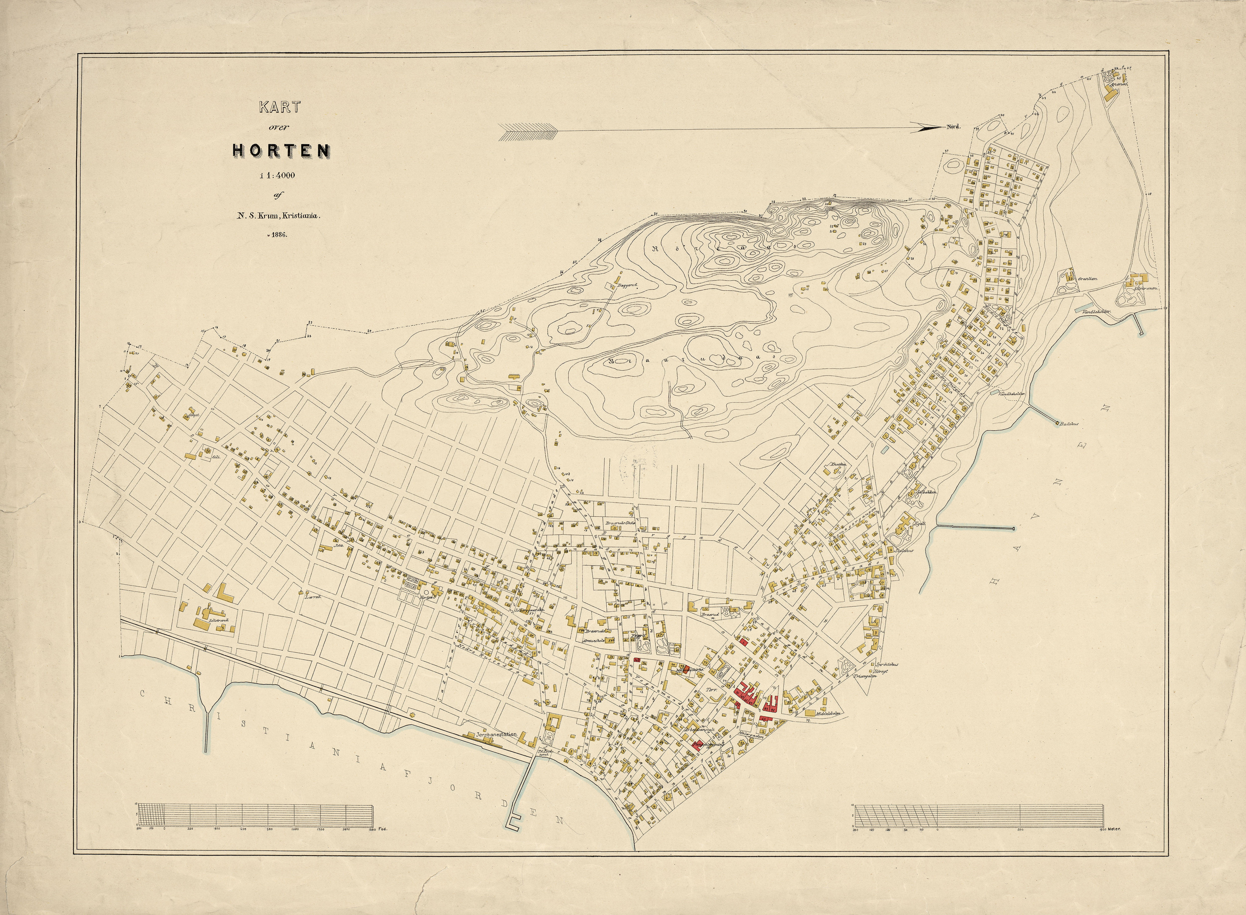 Kart over Horten (1886)